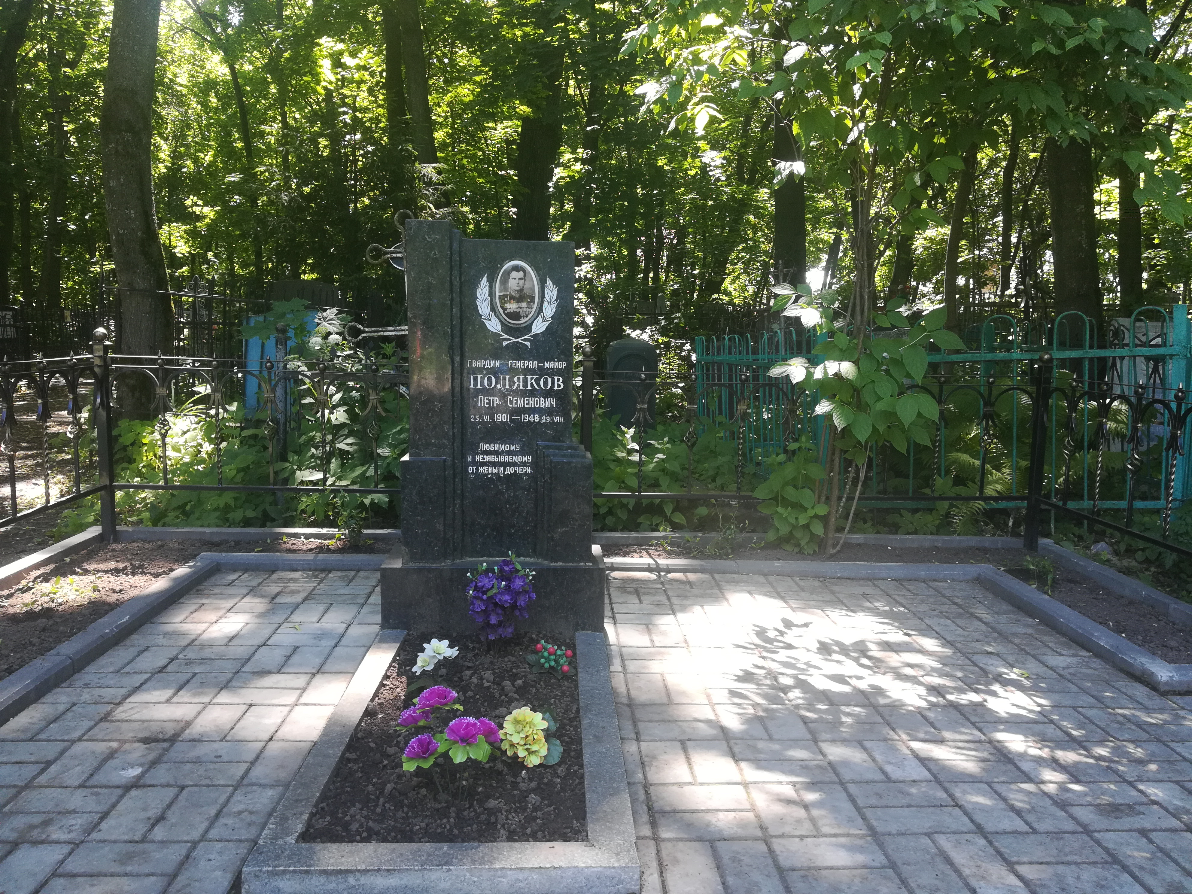 Владимир